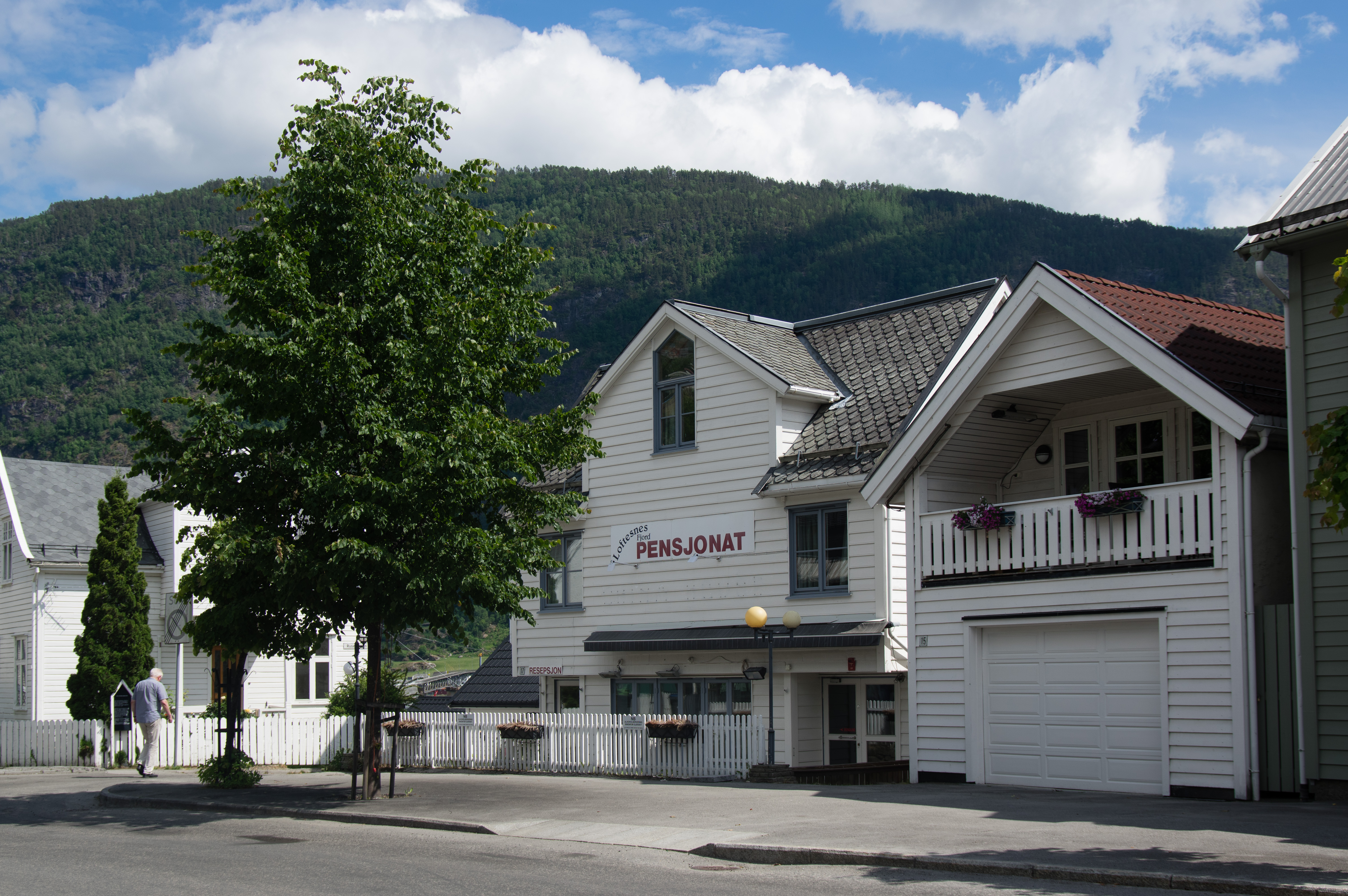 Loftesnes pensjonat i Sogndal. Pensjonatet er no nedlagt, bygget er kjøpet av Sogndal kommune.